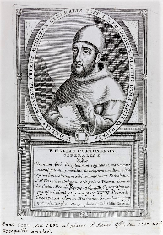 Ricostruzione posteriore di un ritratto del frate francescano Elia da Cortona (risalente al 1233), proveniente da una biografia scritta da storici francescani. La figura è circondata dalla scritta: «F. Helias Cortonensis, primus minister generalis post S. P. Franciscum, electus Romae, obijt in patria».